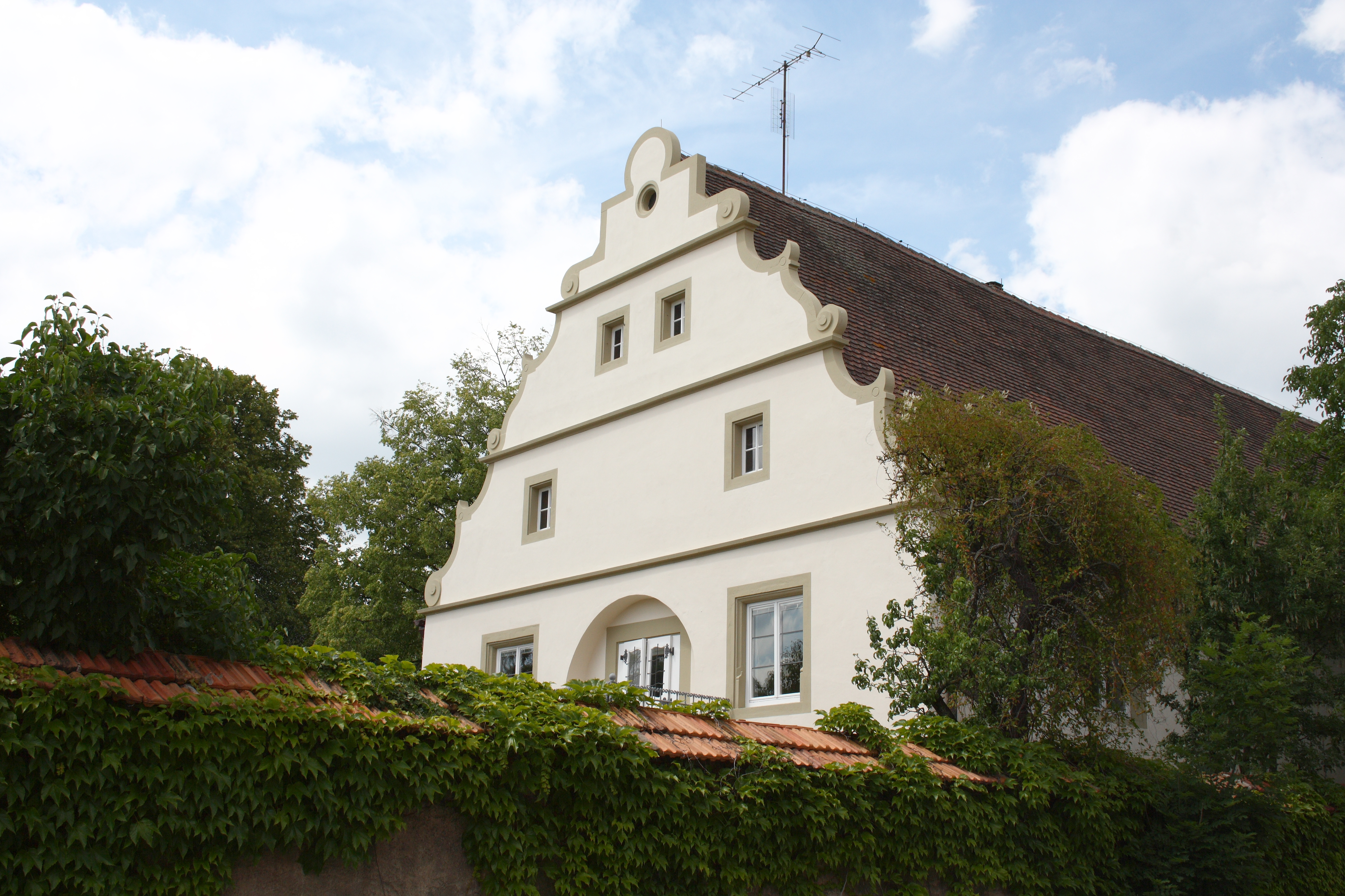 Crailsheimer Schloss in Rödelsee im Landkreis Kitzingen (Bayern)